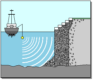 Sonar Sistemi Mesafe Ölçümünü Simgeleyen Görsel